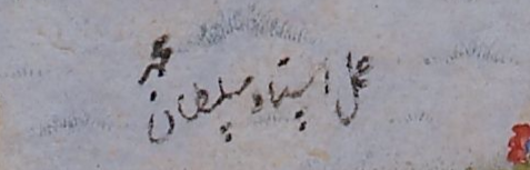 Bəhram Gurun şir ovu miniatüründə Sultan Məhəmmədin imzası